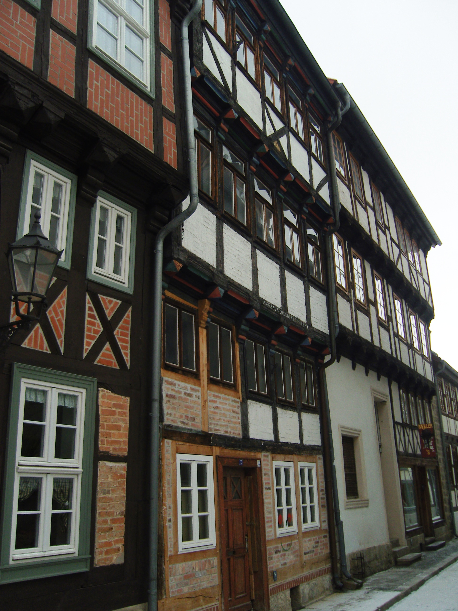 Denkmalgeschütztes Wohnhaus in der Straße Stieg 7 in Quedlinburg